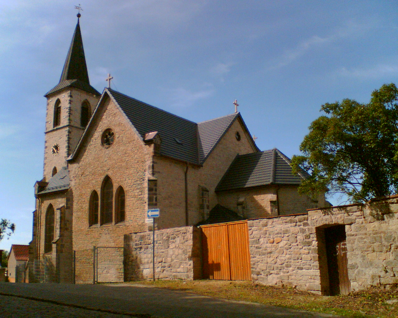 Kirche St. Johannis in Klein Wanzleben, Deutschland